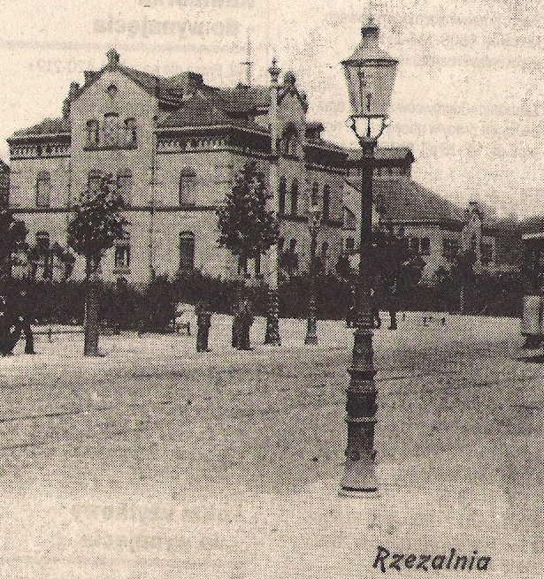 Rzeźnia miejska w Poznaniu na Garbarach. 1904r.